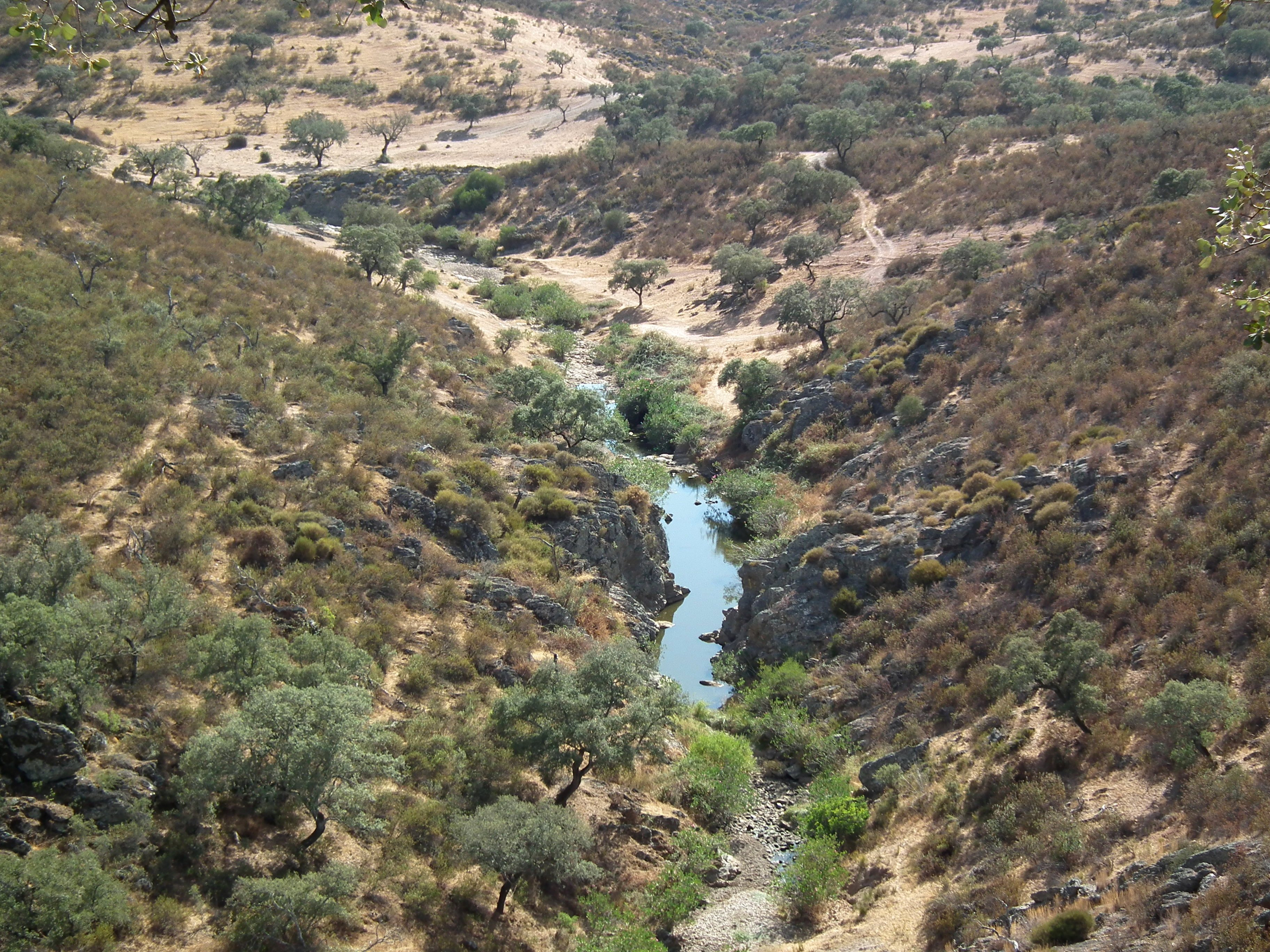 Ribeira da Safareja em Agosto de 2012